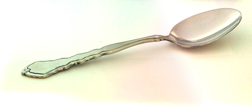 Tablespoon